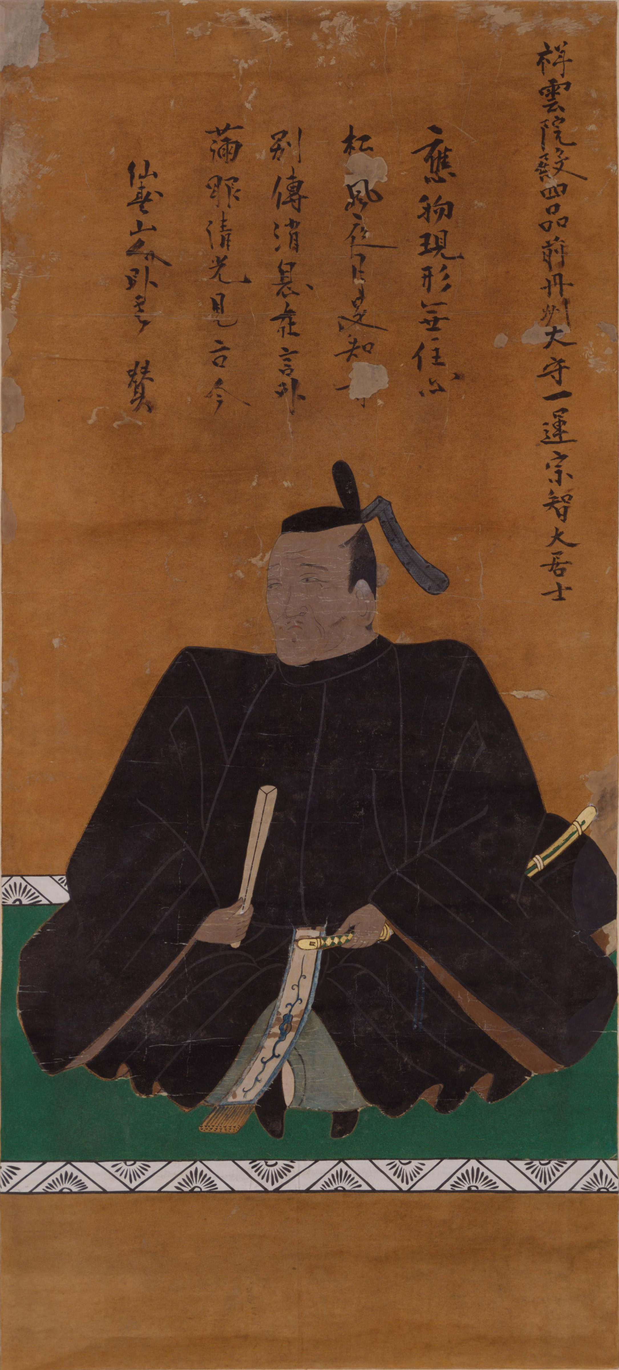 戸田康長の肖像。